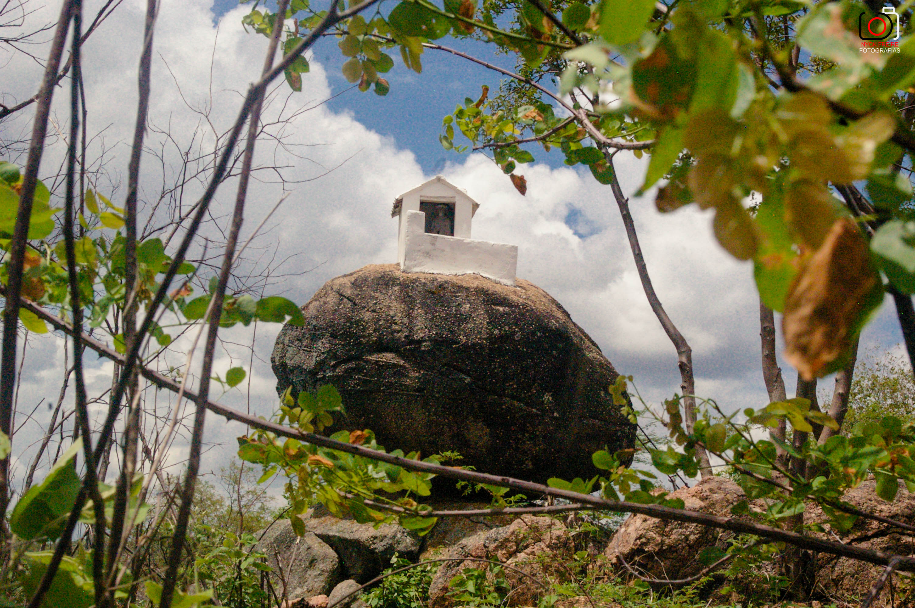 Espaço religioso